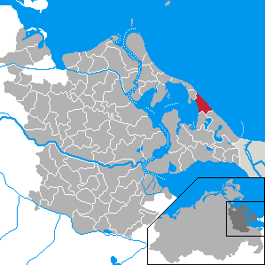 Ückeritz, Landkreis Ostvorpommern, Mecklenburg-Vorpommern